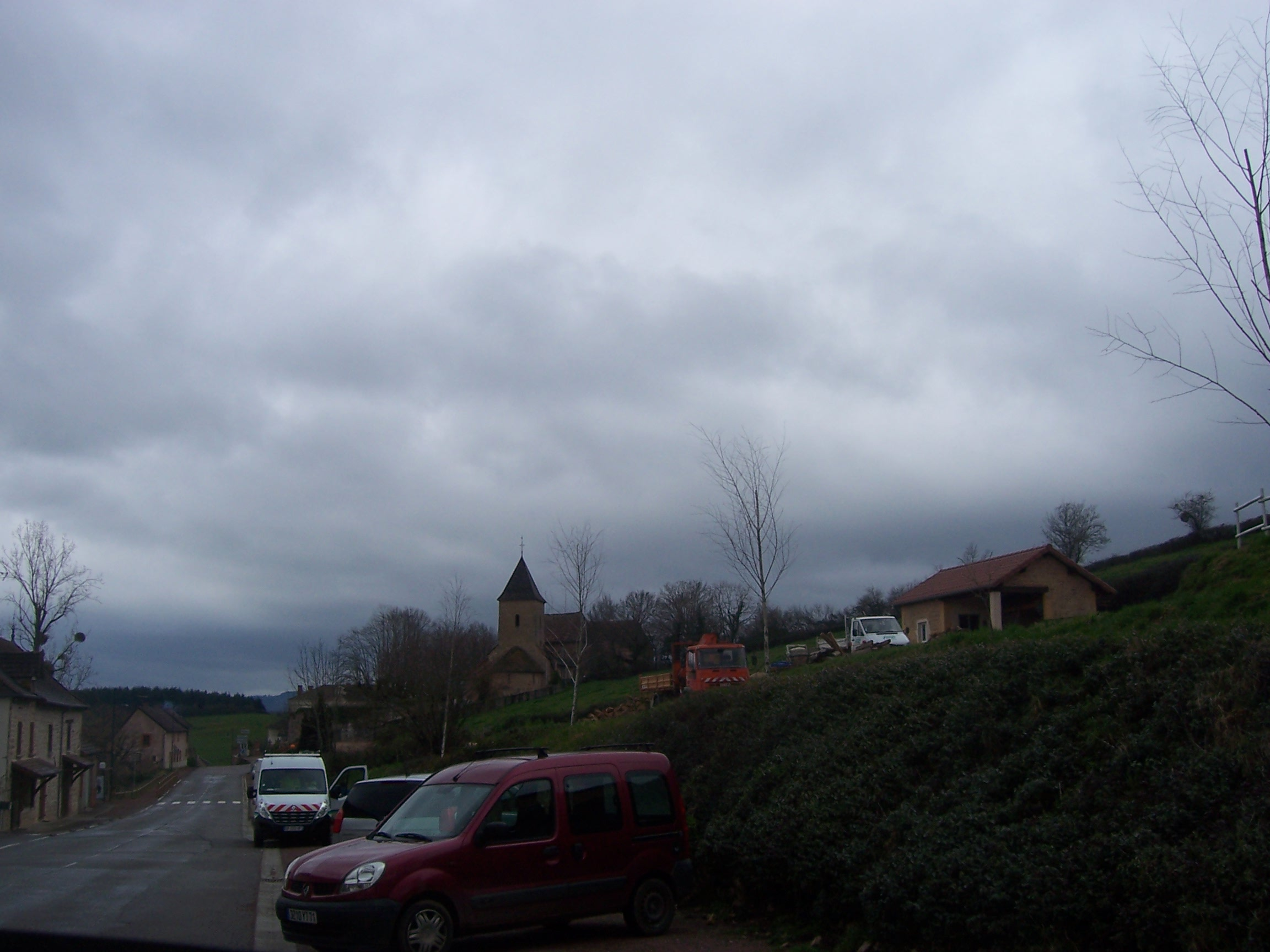 Curtil-sous-Buffières